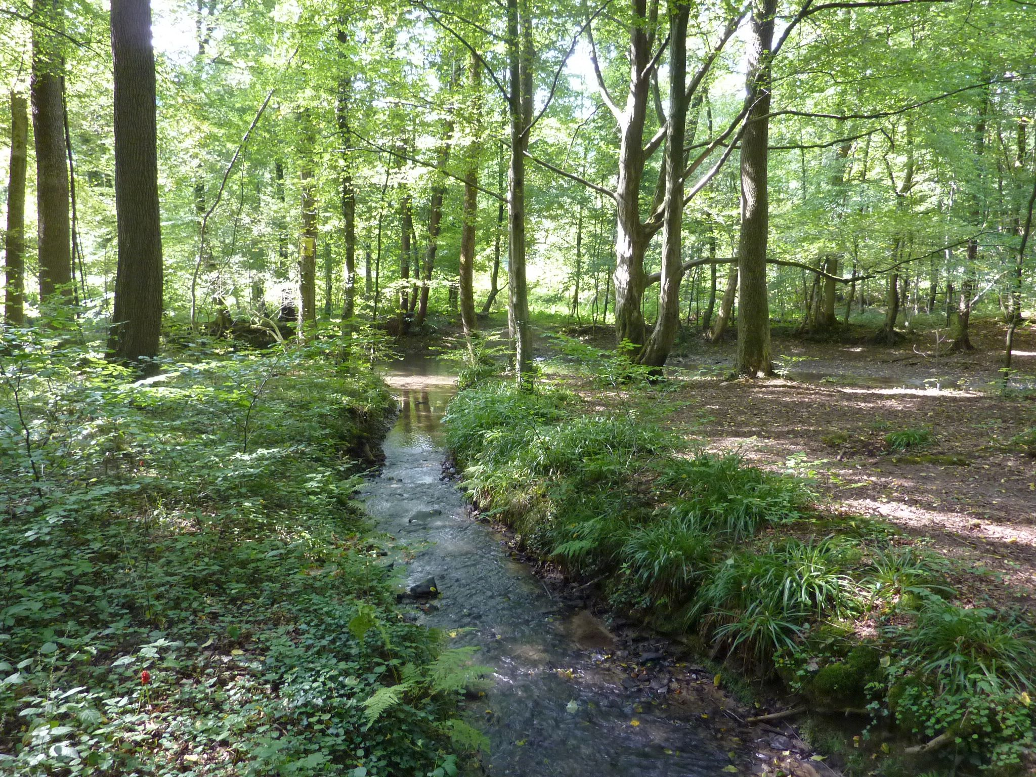 Hortenbach, Mündung in die Dhünn